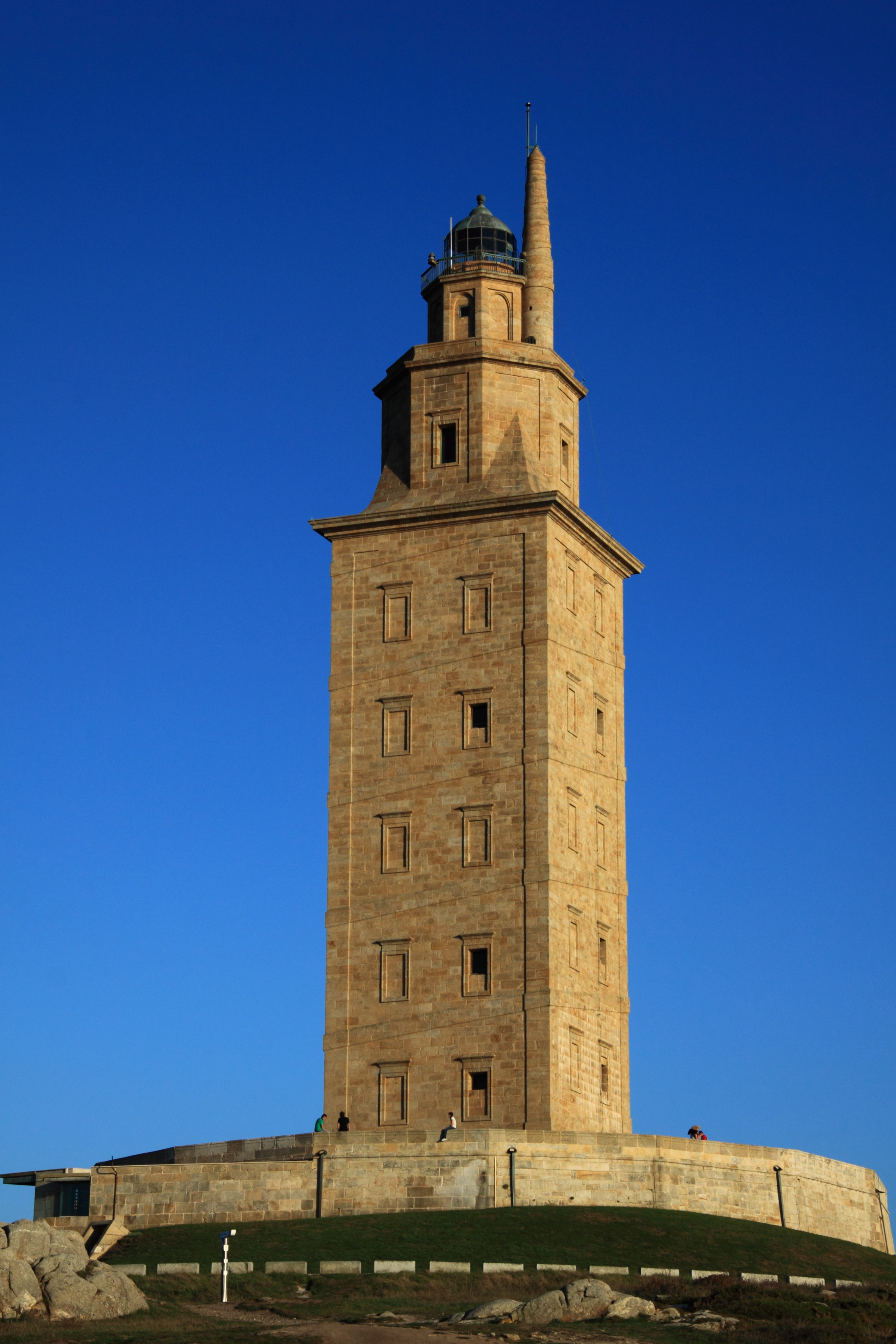 Torre de Hercules, A Coruña